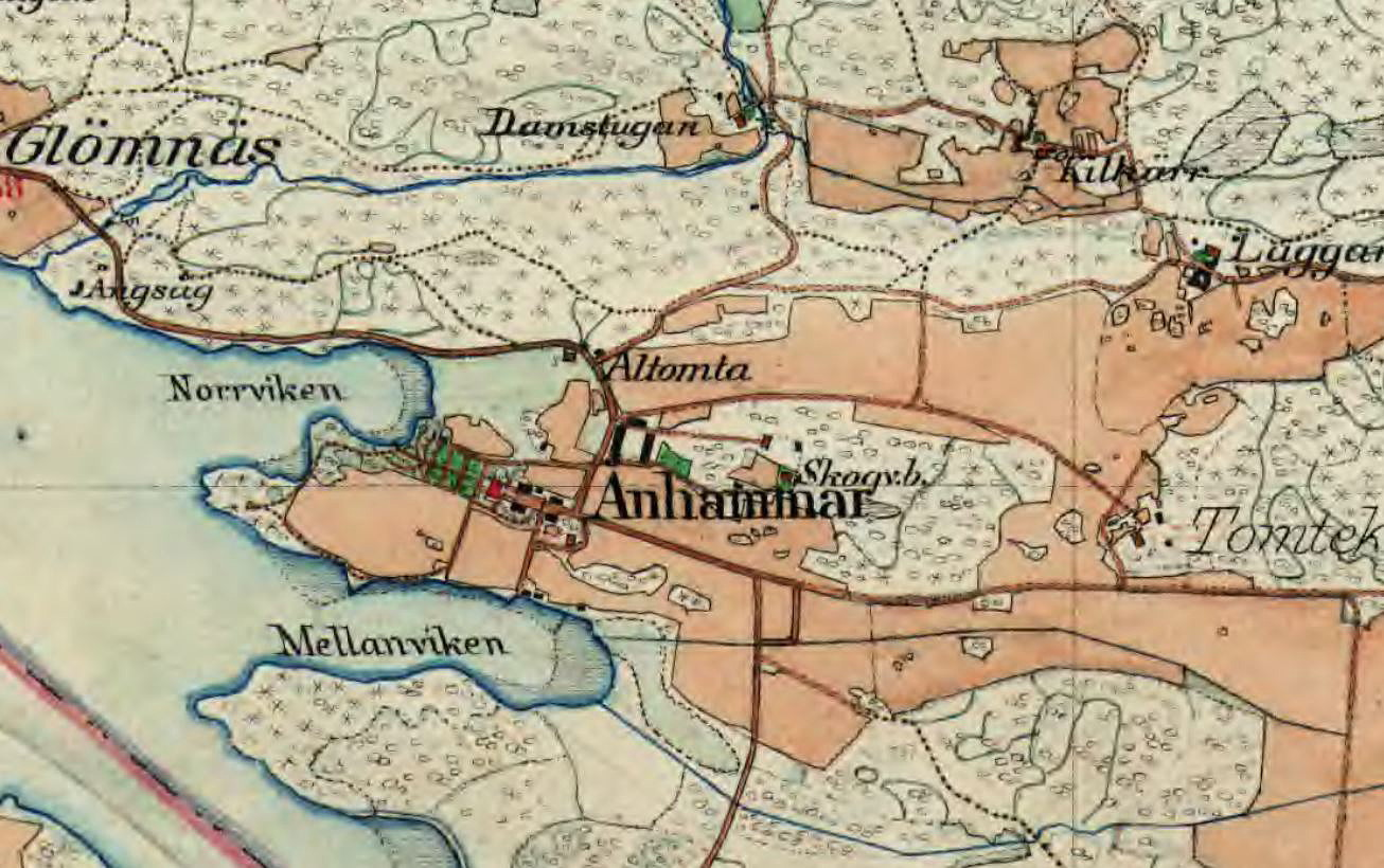 Ånhammar herrgård på Häradsekonomiska kartan